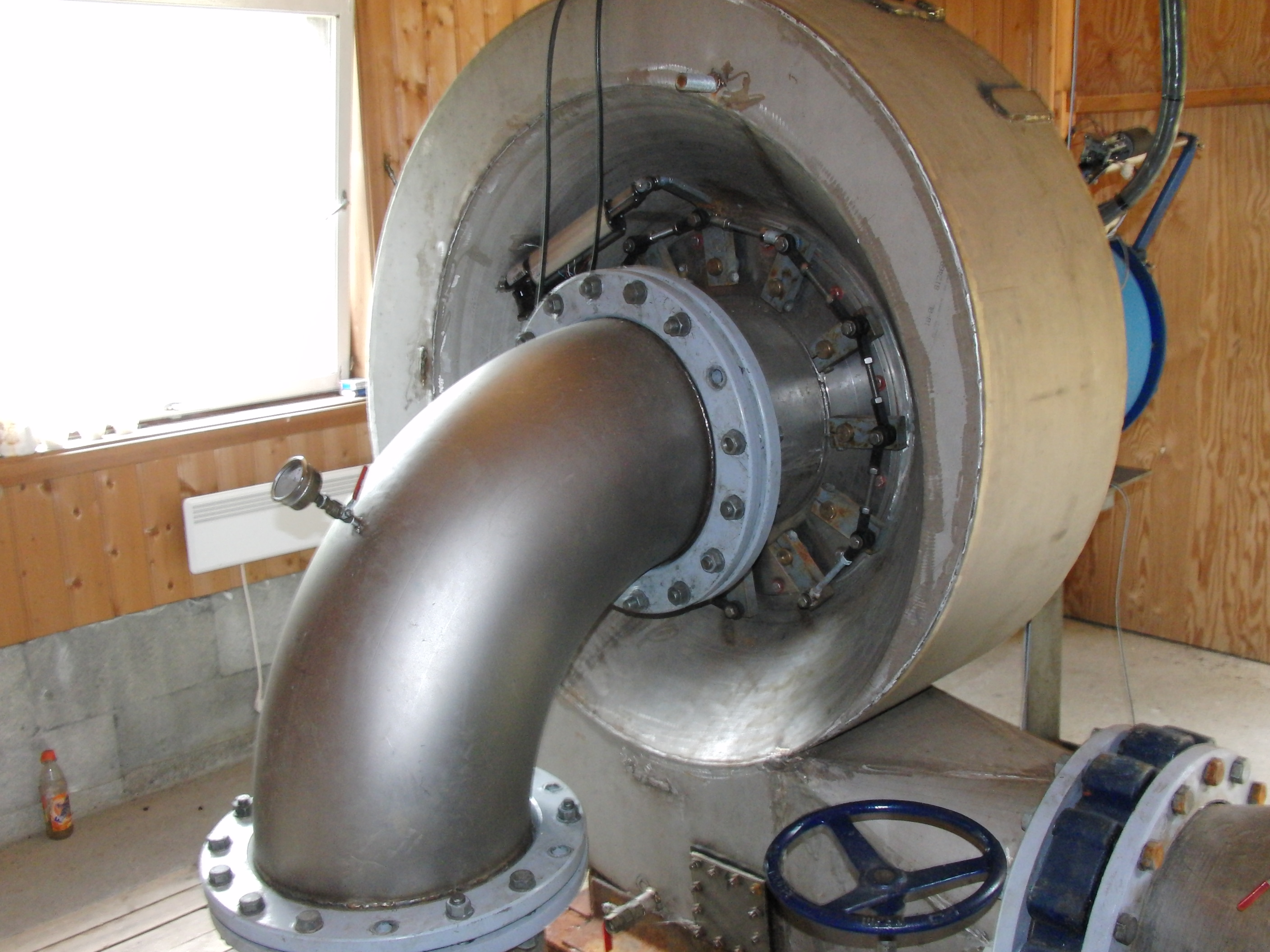 Horisontal kaplanturbin, Mone Kraft